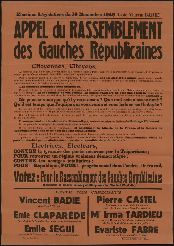 Appel du rassemblement des gauches républicaines. Élections législatives du 10 novembre 1946 (liste Vincent Badie). (Béziers : Imprimerie Mathieu et compagnie)